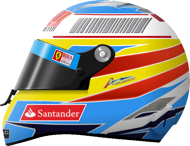 Fernando Alonso (Ferrari) 2010